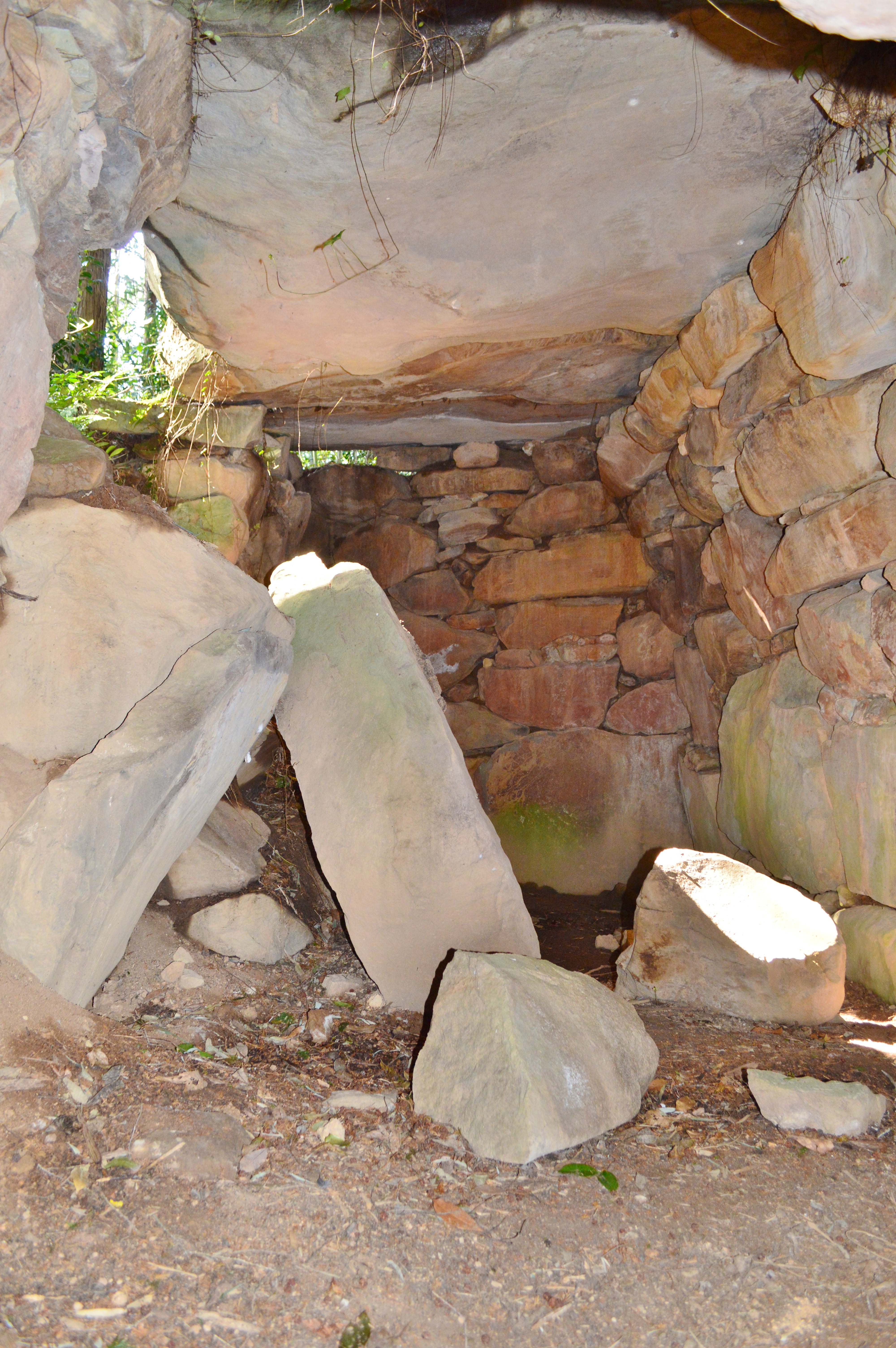 長者ヶ平古墳 石室玄室 (奥壁側)